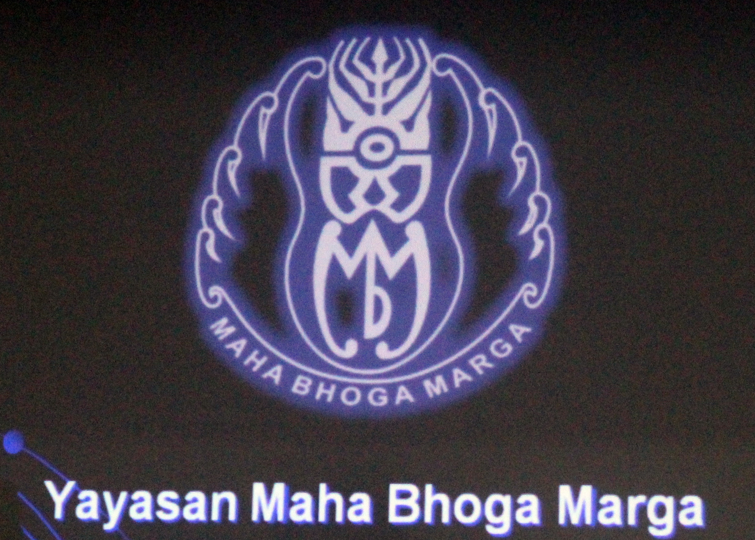 Logo MBM